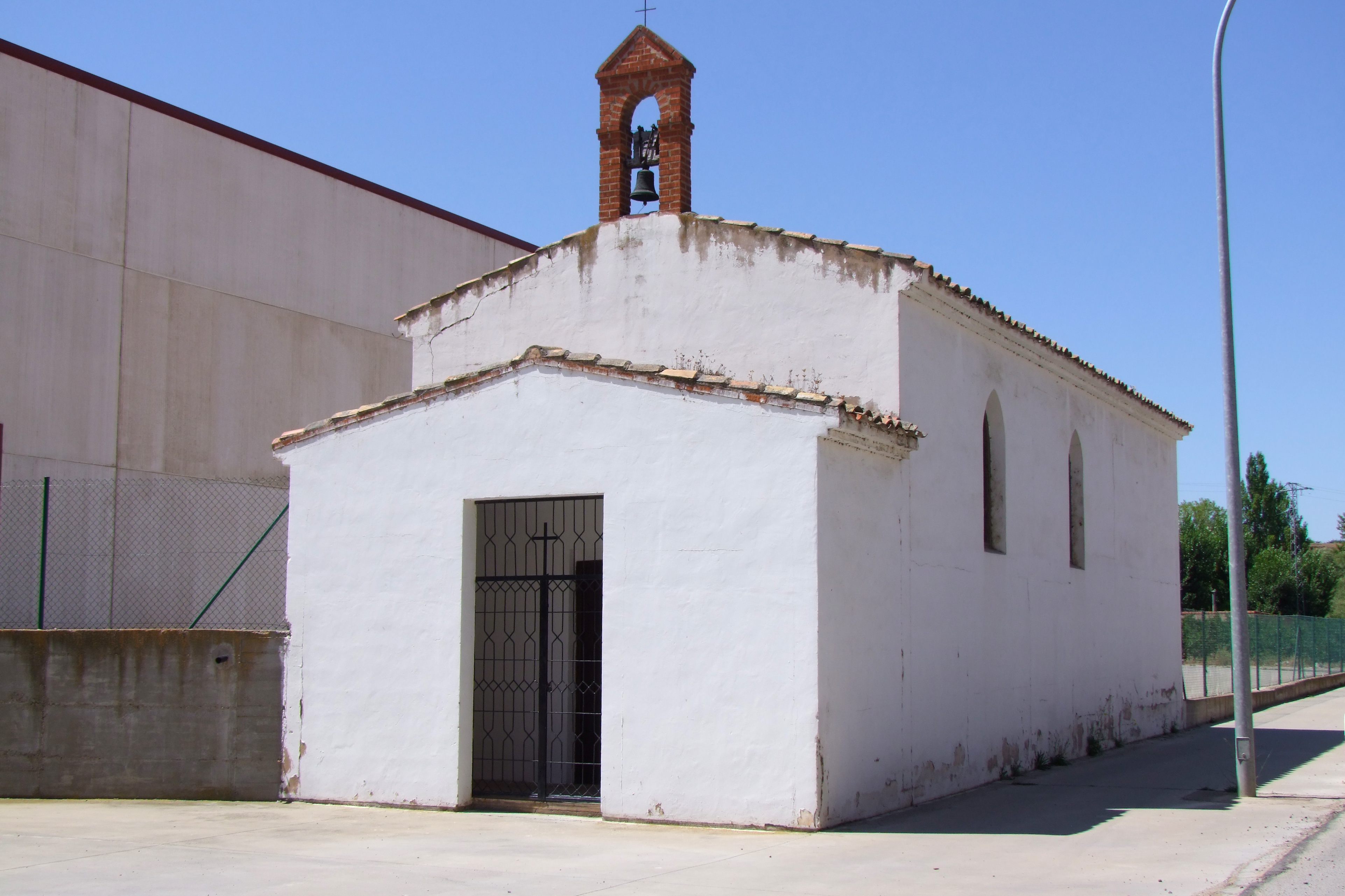 Ermita del Carmen en la localidad de Autol, La Rioja - España